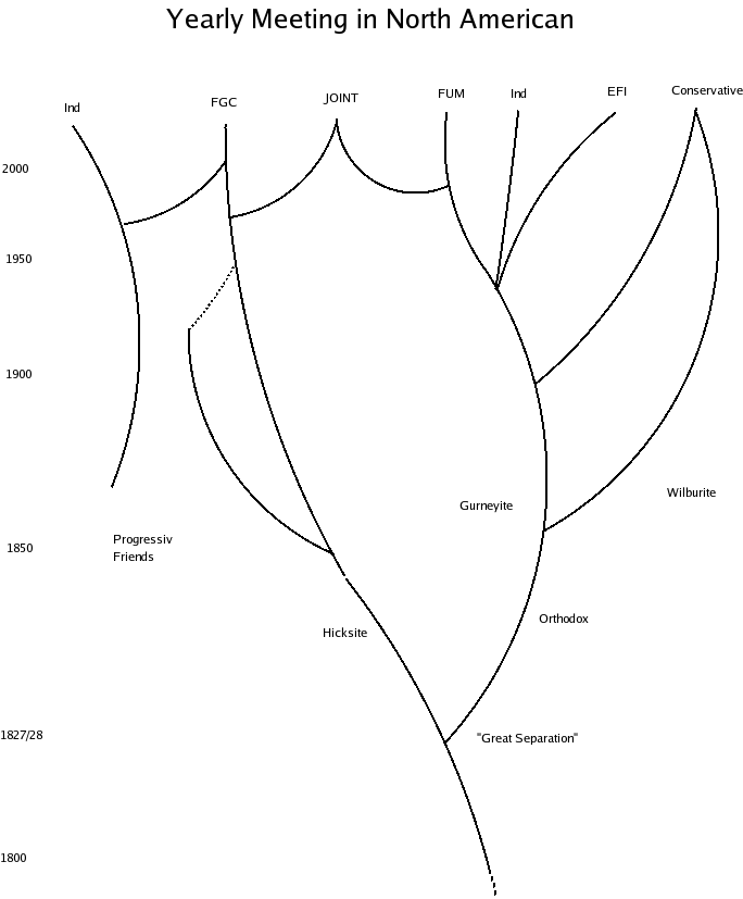 Quäker-Geschichte und Entwicklung in Nord-Amerika, selbst erstellt. Nach Vorlage aus: Historical Dictionary of the Friends (Quakers), hg. von Abbott, Margery u.a. Lanham, 2003 (Religions, Philosophies, and Movements Series, 46).